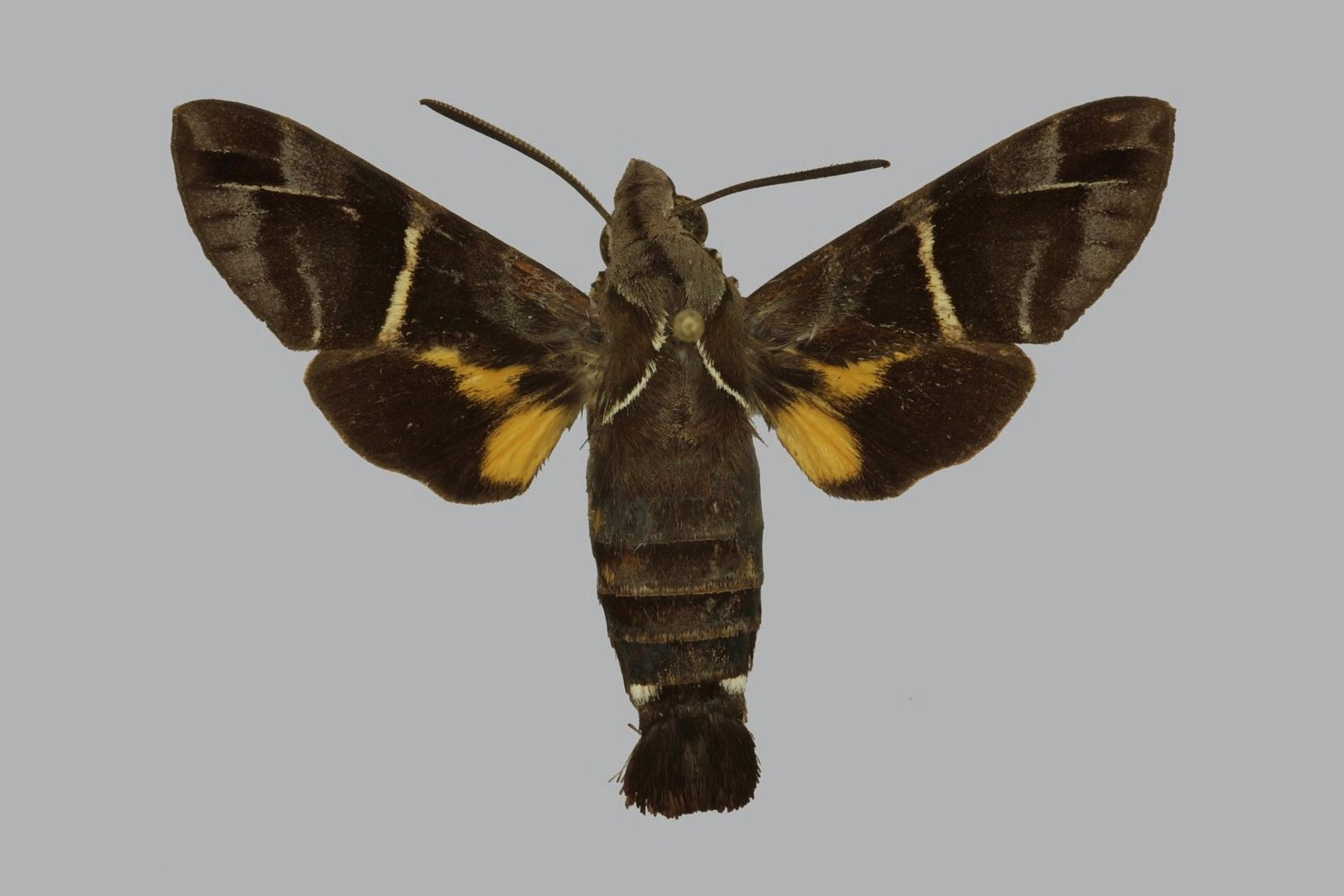 Macroglossum albigutta albigutta, male, upperside. Solomons, Guadalcanal, ridge north of Mount Popomanaseu